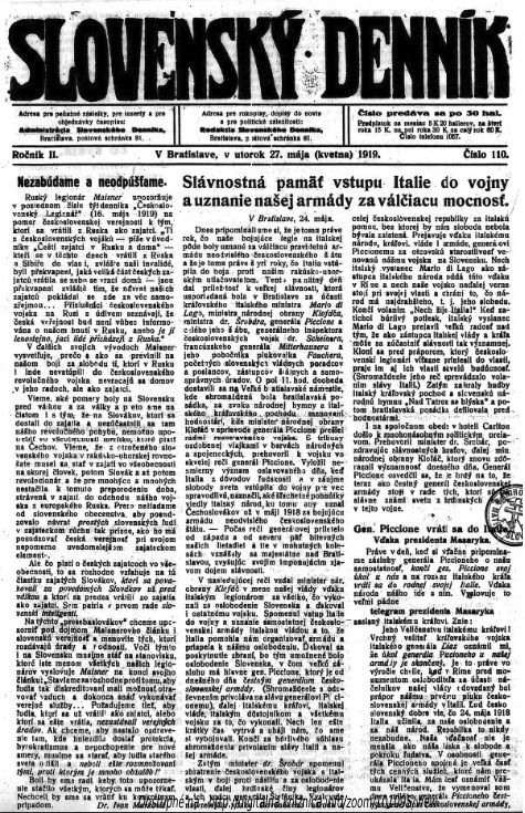 Titulný list periodika Slovenský denník, ktorý vychádzal na Slovensku od r. 1918 do r. 1938.